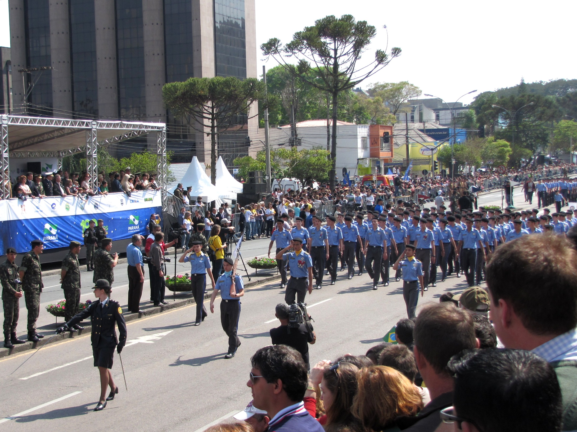 Desfile de 7 de Setembro de 2012 - Colégio da Polícia Militar do Paraná.